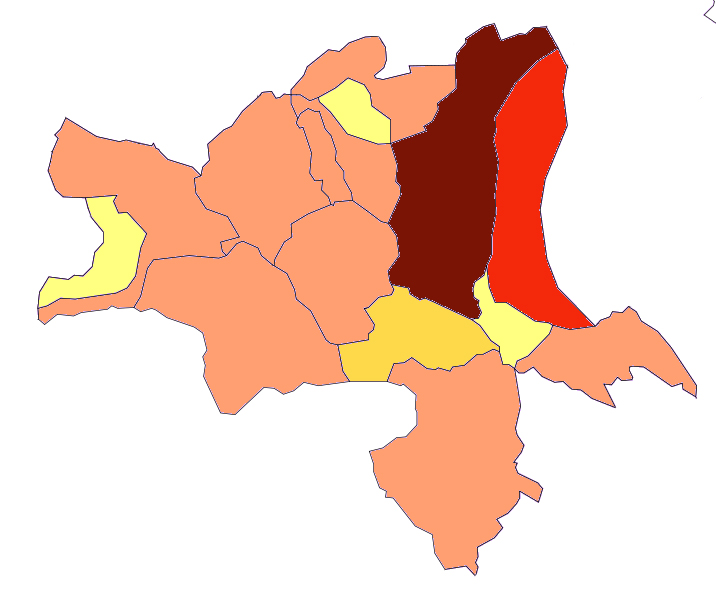 Distribución demógrafica por municipios de la comarca de Arnedo